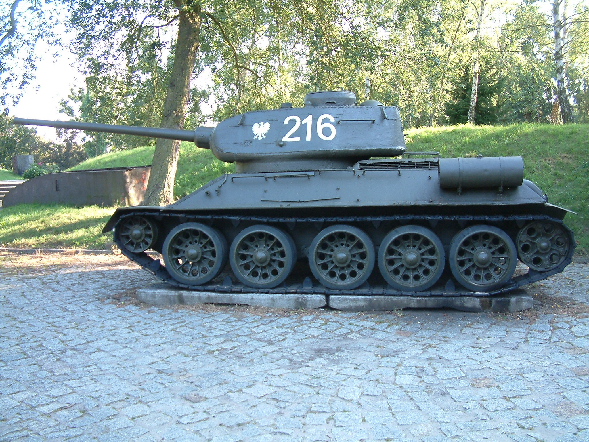 T-34/85, Fort Winiary, Poznań